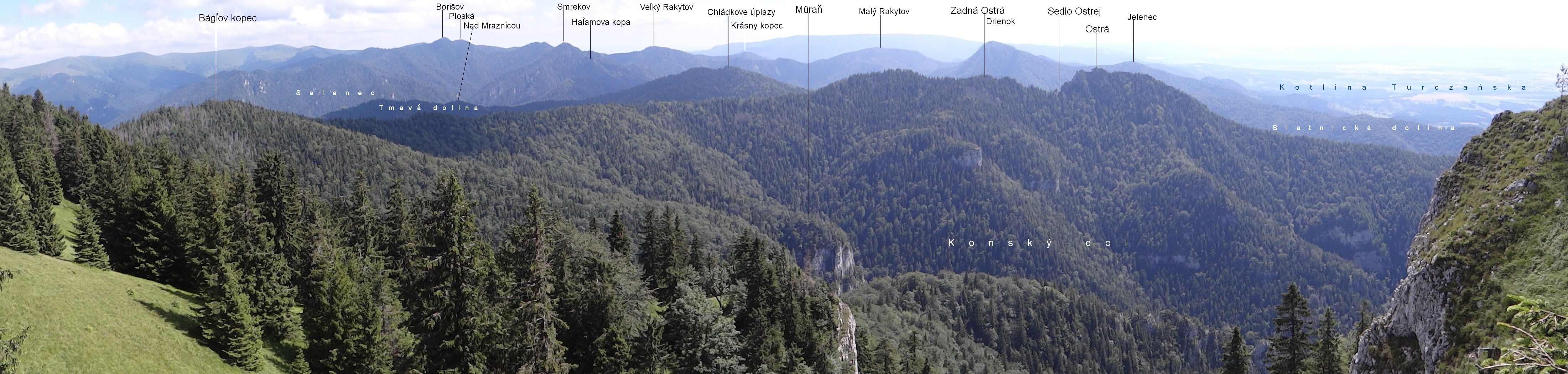 Konský dol. widok z jedego z grzbietów Tlstej w Wielkiej Fatrze